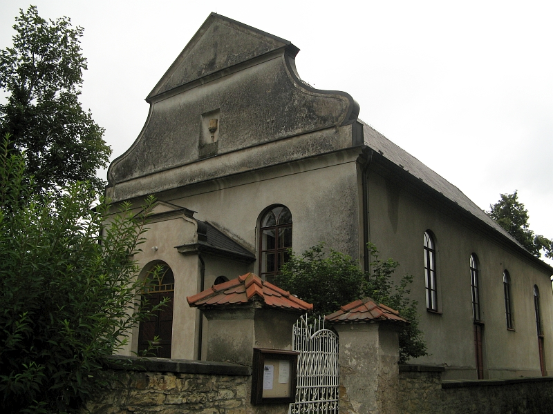 Kostel Církve českobratrské evangelické, Dolní Sloupnice.